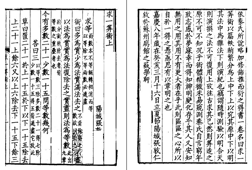 中文（中国大陆）: 张敦仁《求一算术》